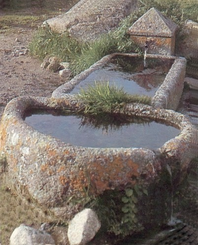 Brunnen im Weiler Rieutort-d'Aubrac